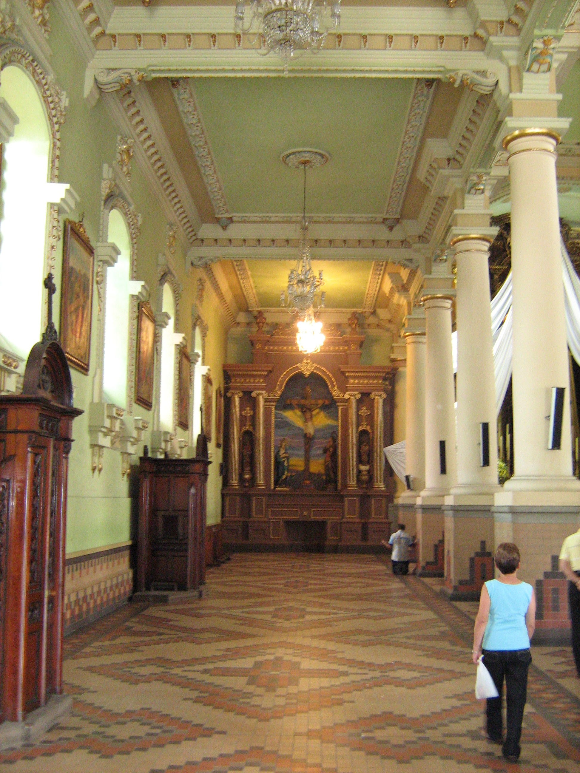 Iglesia de Santa Gertrudis en Envidado, Antioquia, Colombia